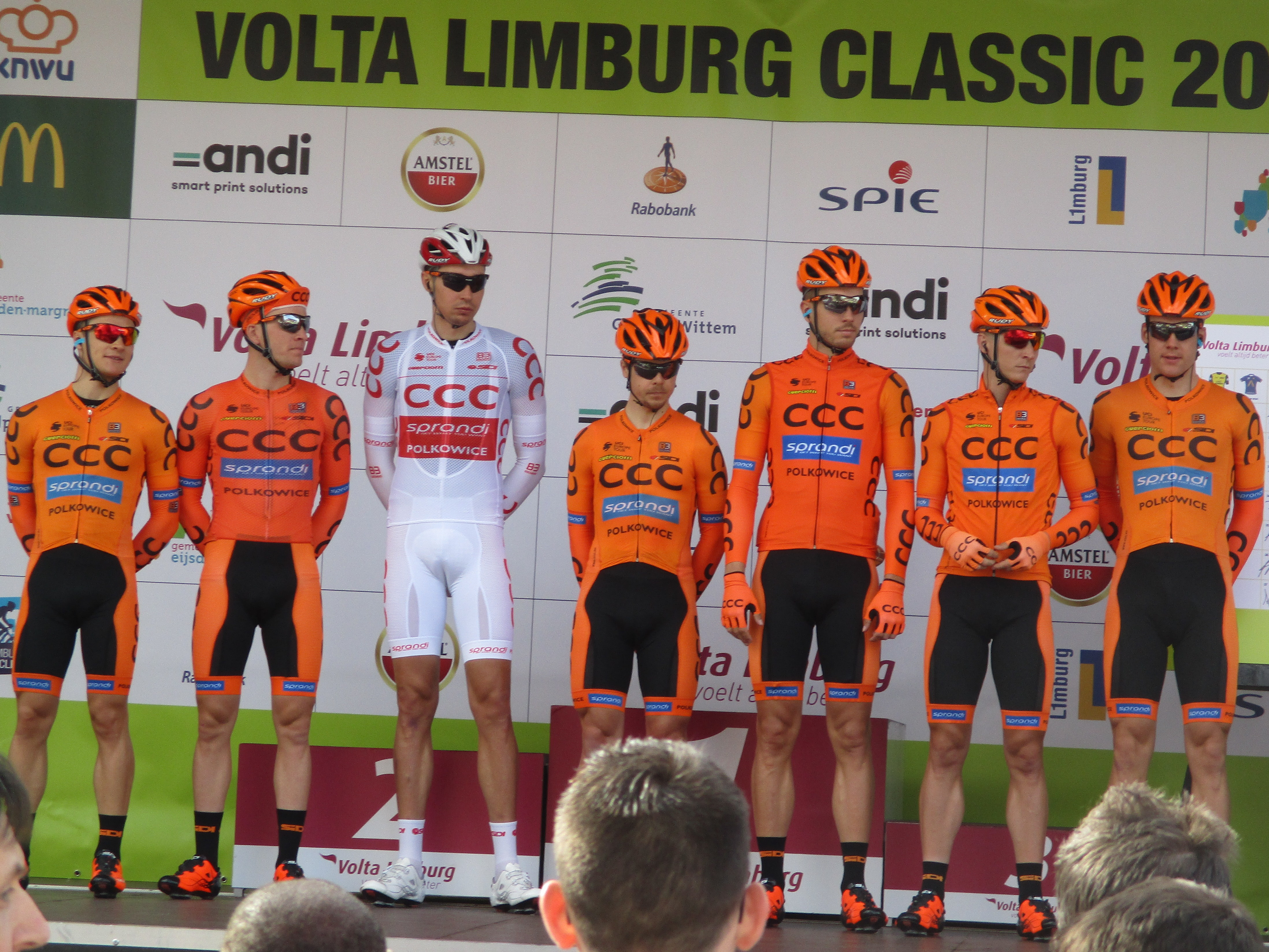 Start van de Volta Limburg Classic 2018 in de Diepstraat in Eijsden